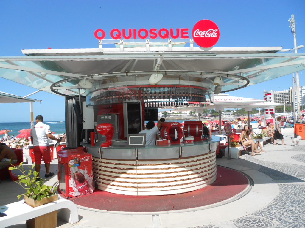 Quiosque da Coca-Cola, situado na orla da Praia de Copacabana, Rio de Janeiro, Brasil.